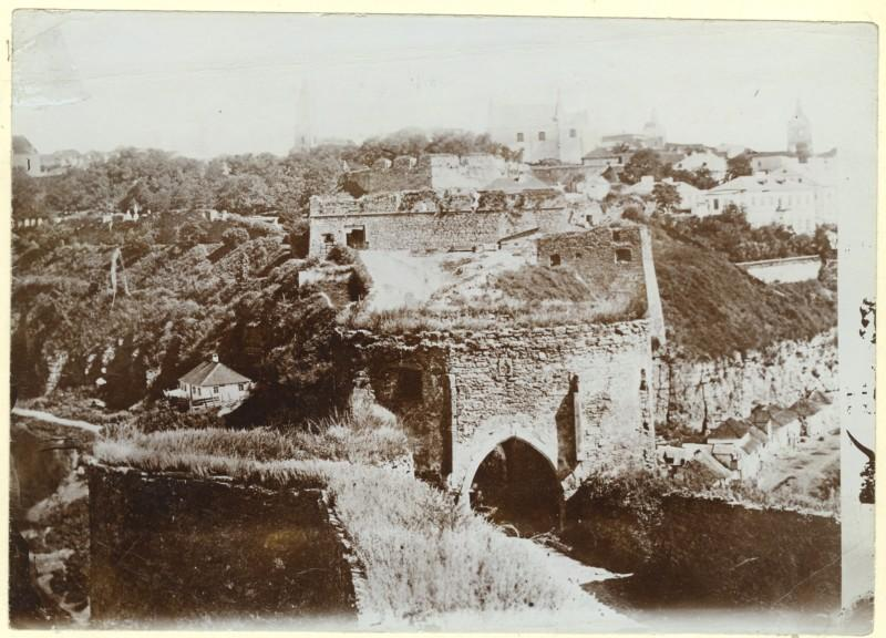 Вежа на замковому мості . Замкові міські ворота